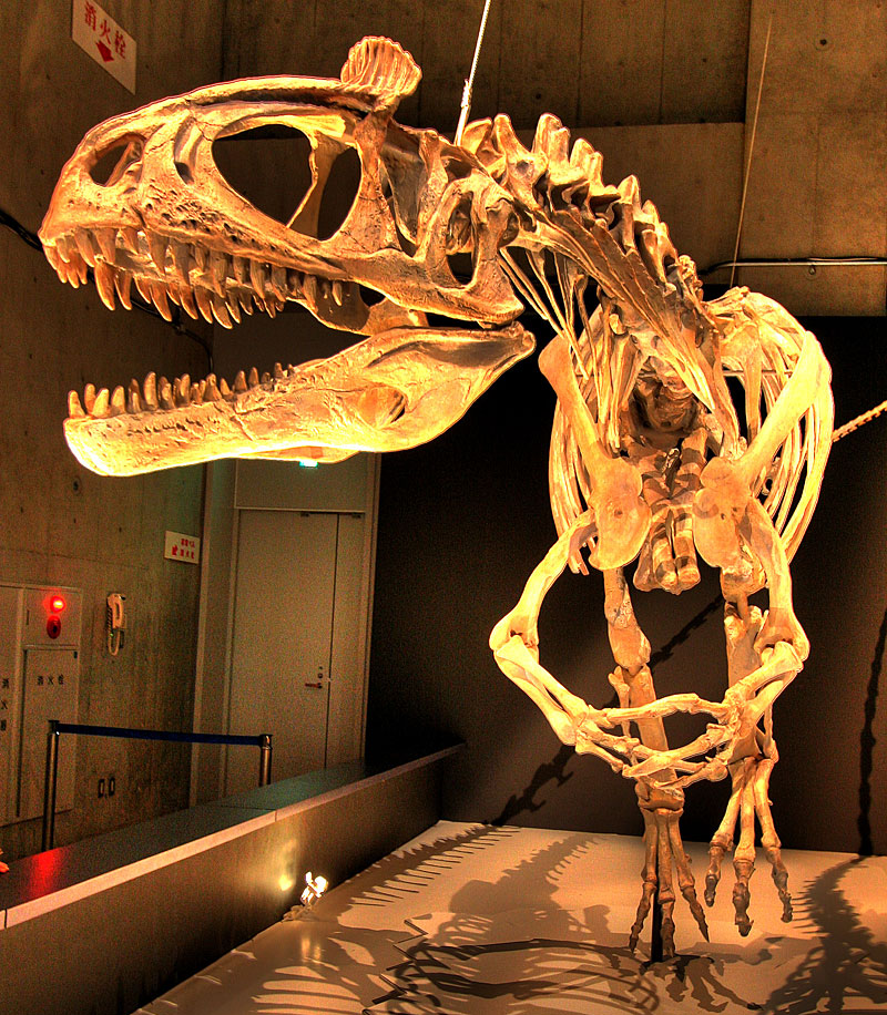 Mar. 27, 2009 東京 上野 国立科学博物館